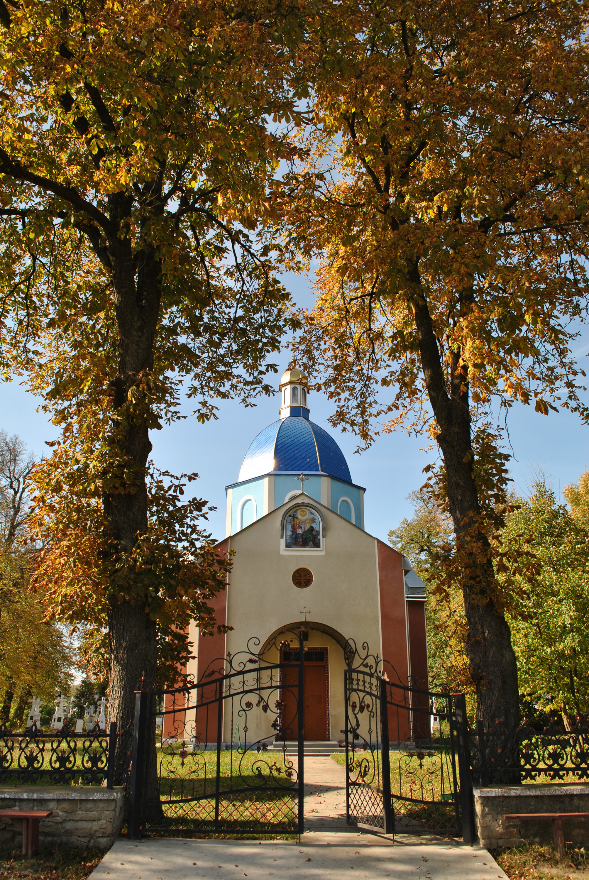 Церква Святого Духа (мур.) у селі Білявинці Бучацького району Тернопільської області.